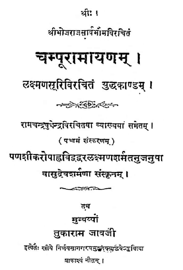 लक्ष्मण सूरी द्वारा लिखित चंपू रामायण युद्ध कांड पंचम संस्करण